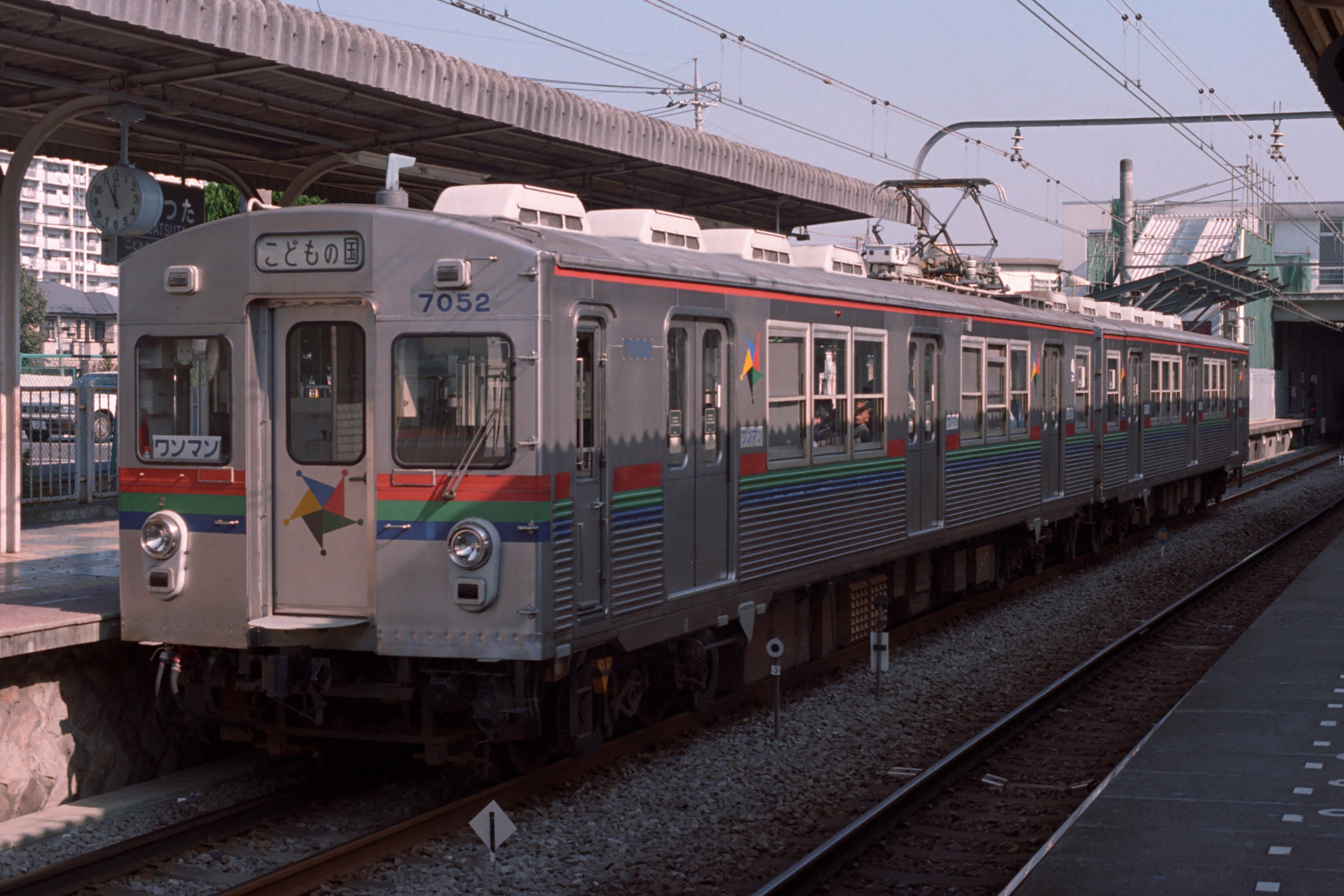 東急7000系こどもの国線用7057F